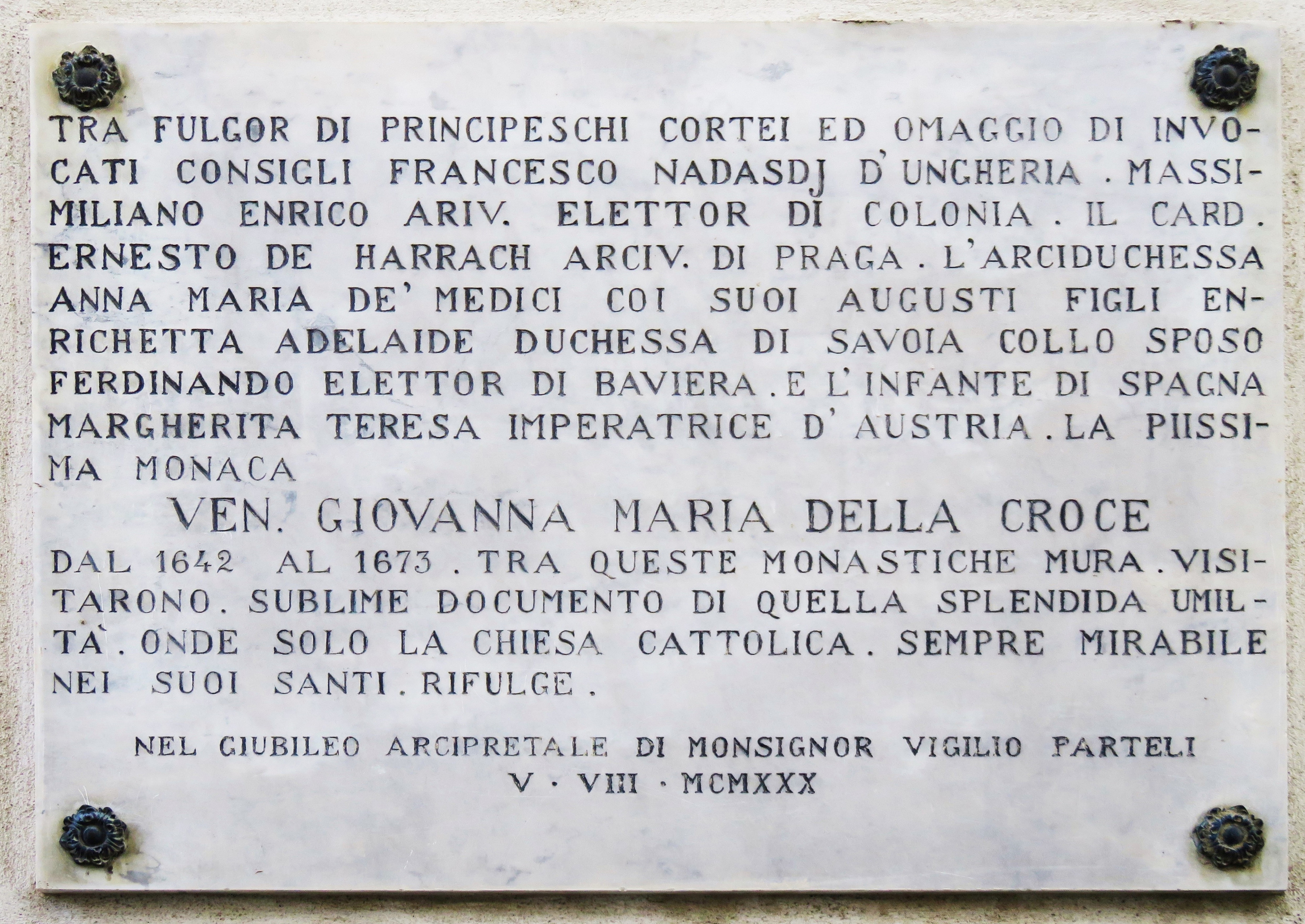 Epigrafe in via Conciatori a Rovereto. posto sulla parete del convento fondato da Giovanna Maria della Croce (Bernardina Floriani)